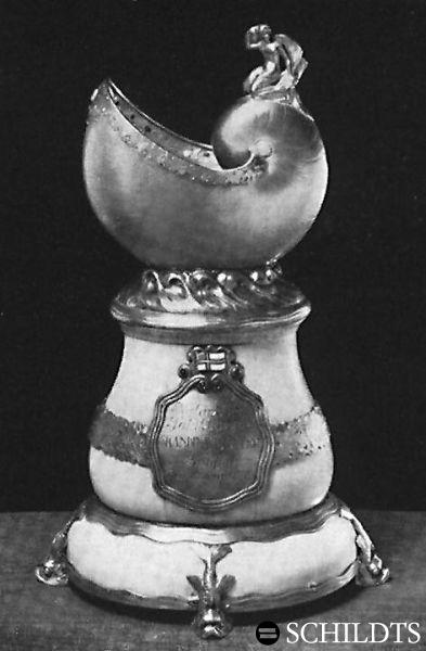 Guldpokalen. Vandringspokal uppställd av Nyländska Jaktklubben, Finland 1919.